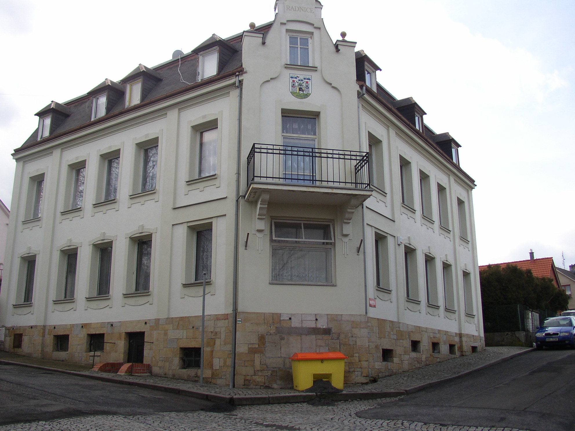 Budova radnice v Jiřetíně pod Jedlovou